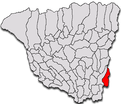 Categorie:Hărţi ale judeţului Gorj